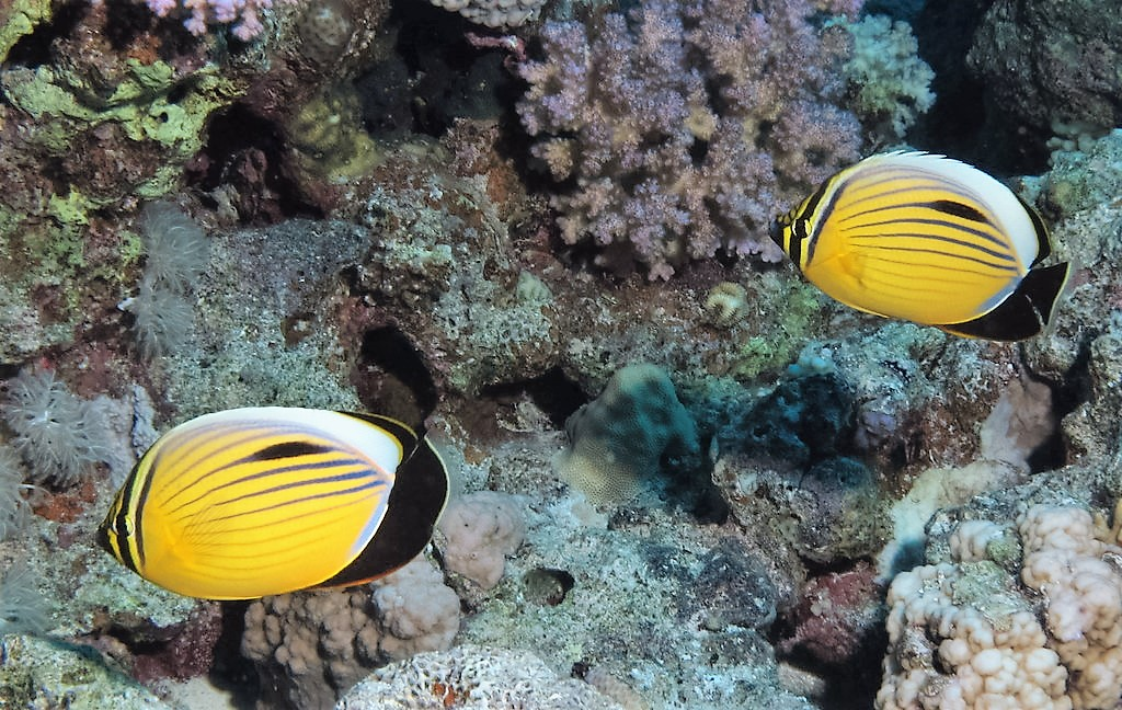 Pareja de Chaetodon austriacus, Gota Abu Ramada, mar Rojo, Egipto.